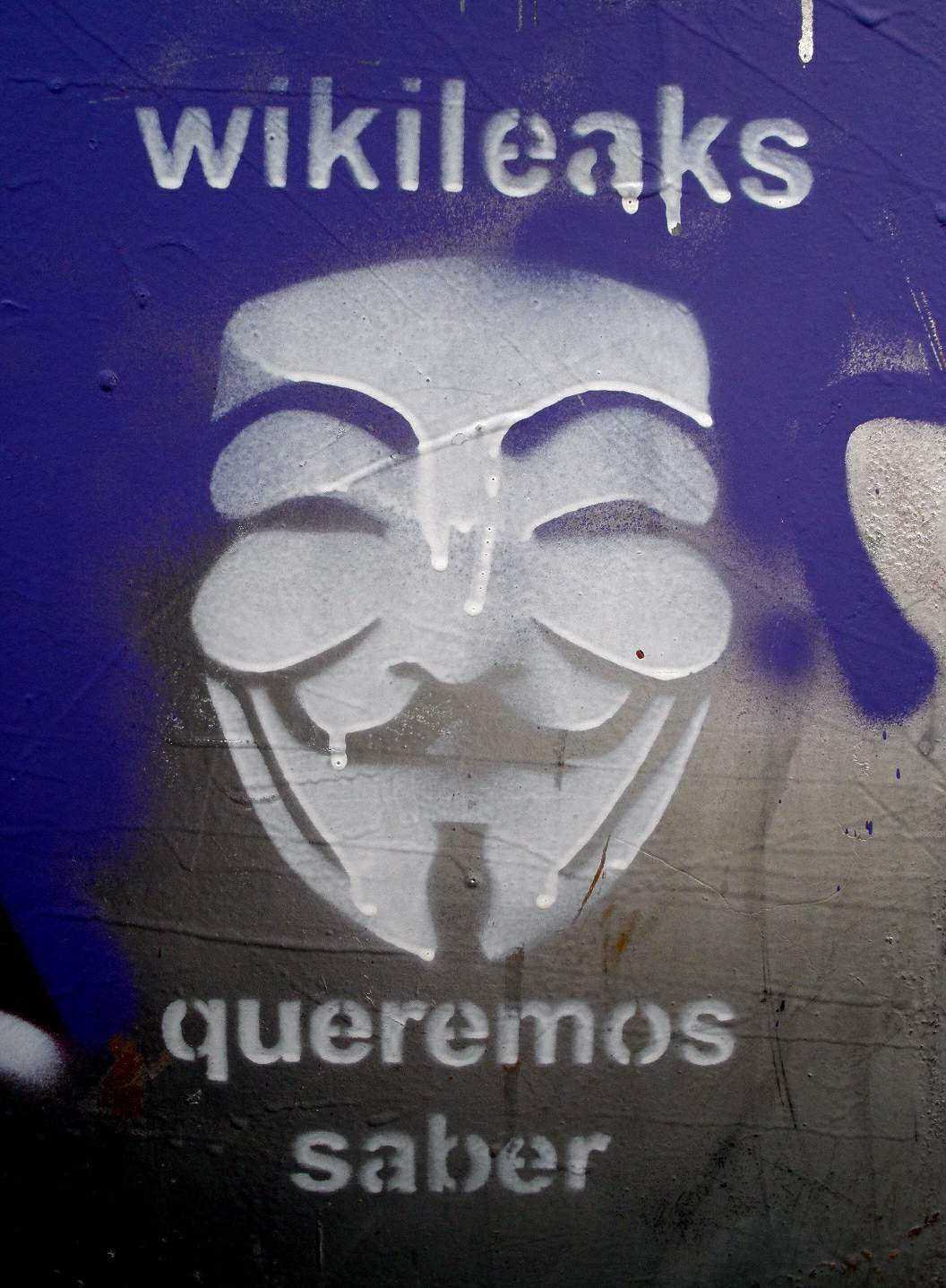 Graffiti en la Ribera de Deusto, Bilbao